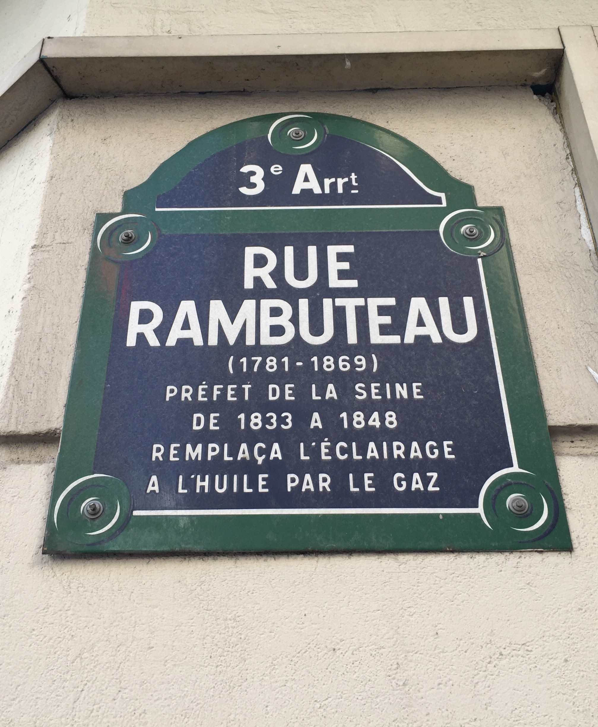 Rue Rambuteau.